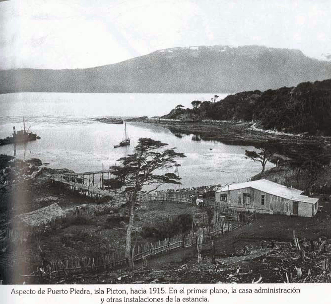 Puerto Piedra en Isla Picton, ca. 1915